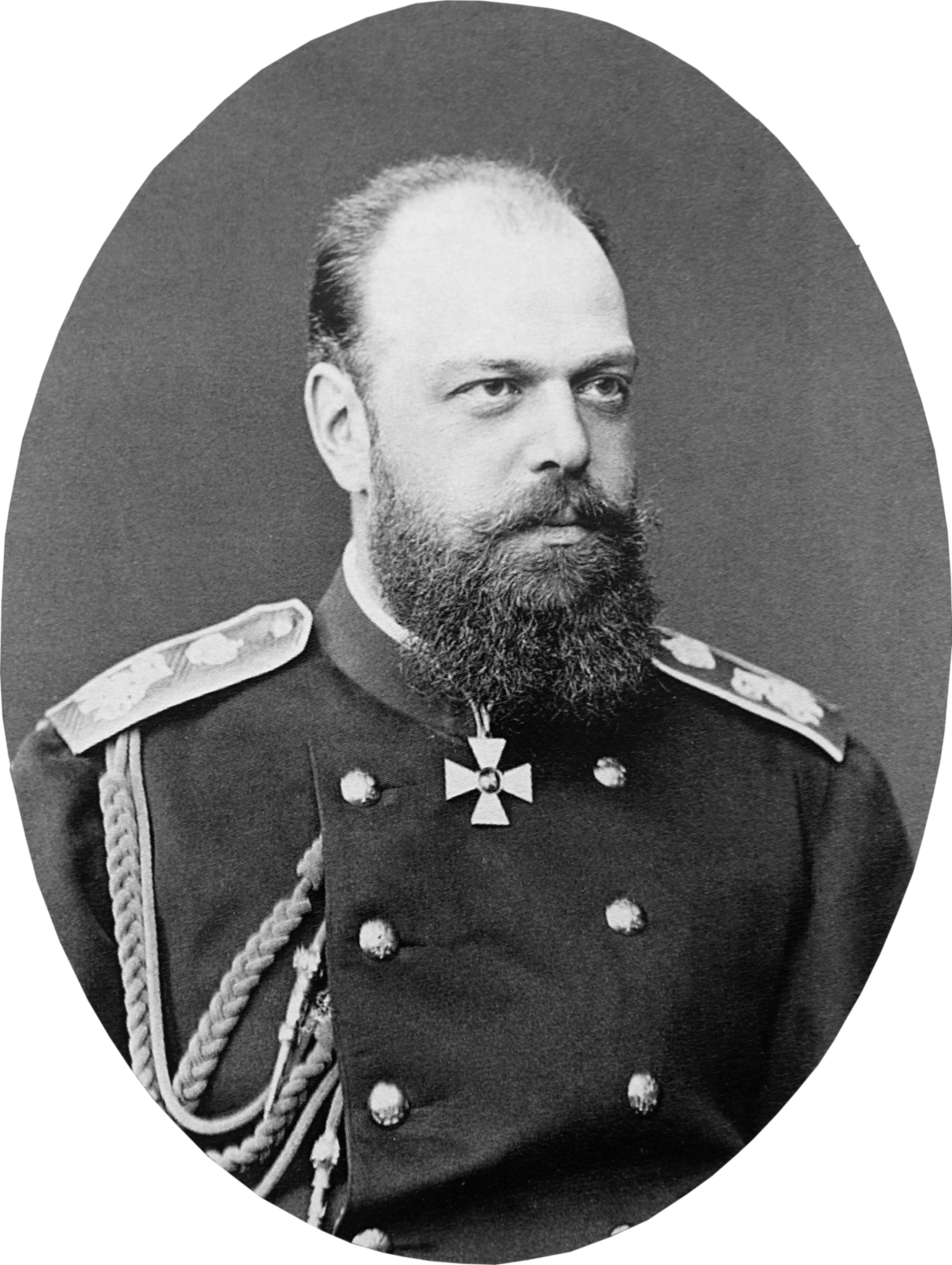 Портрет Александра III